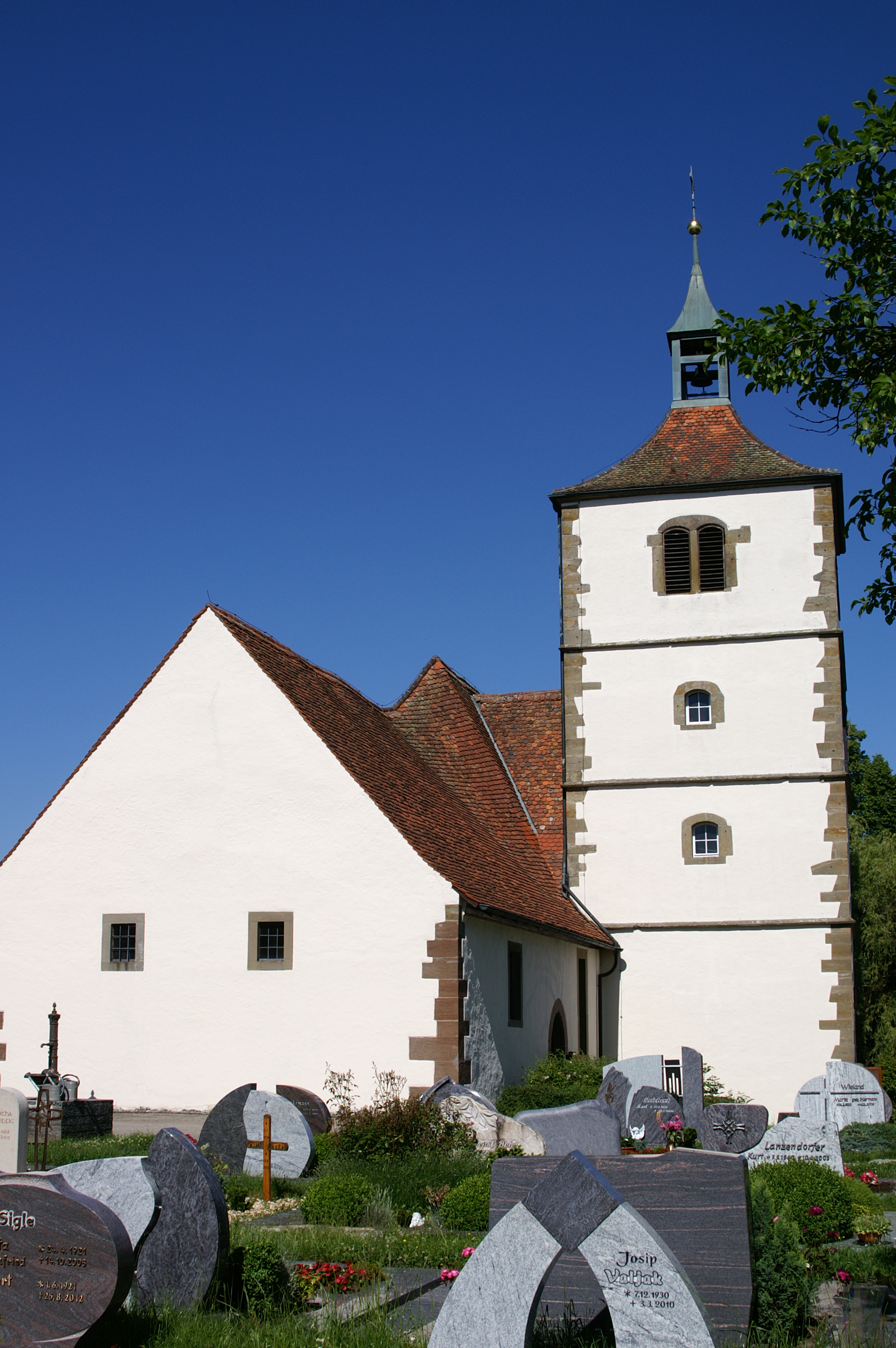 Außenansicht der St.-Martinskirche (Stöckenburg)